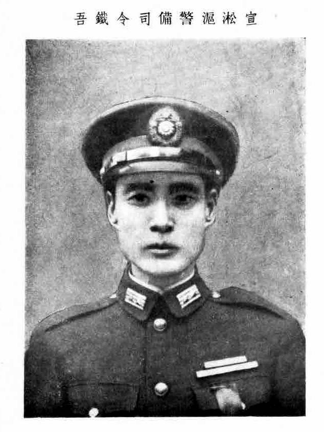 中文（台灣）: 上海市公訓同學紀念